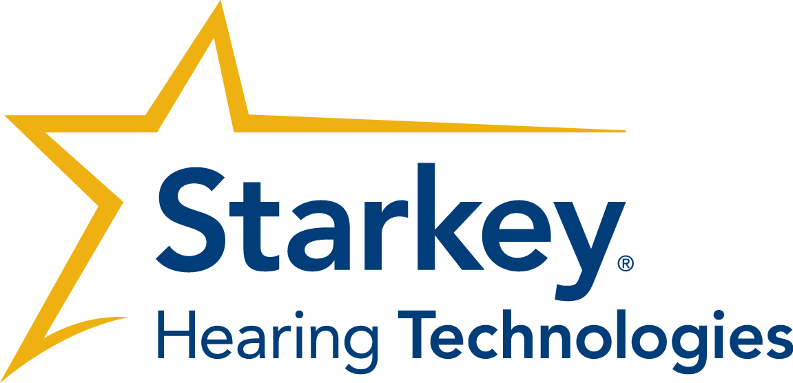 Este é o logo da empresa de aparelhos auditivos Starkey